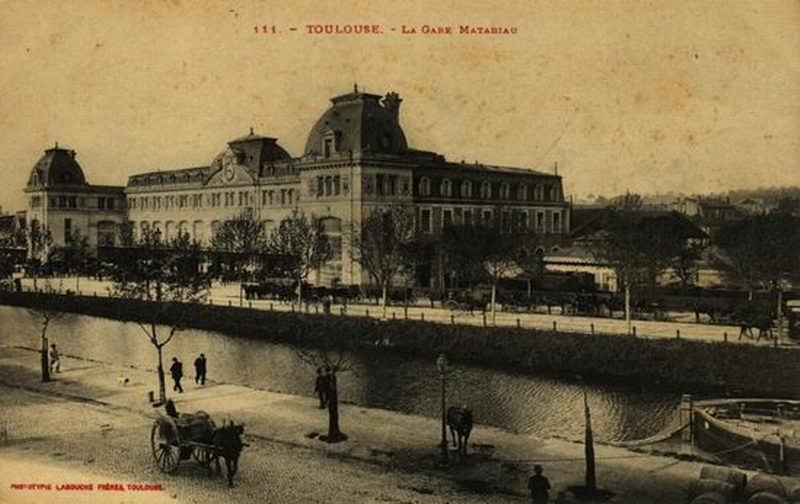 France, Haute-Garonne, Toulouse, gare de Matabiau et canal du Midi.